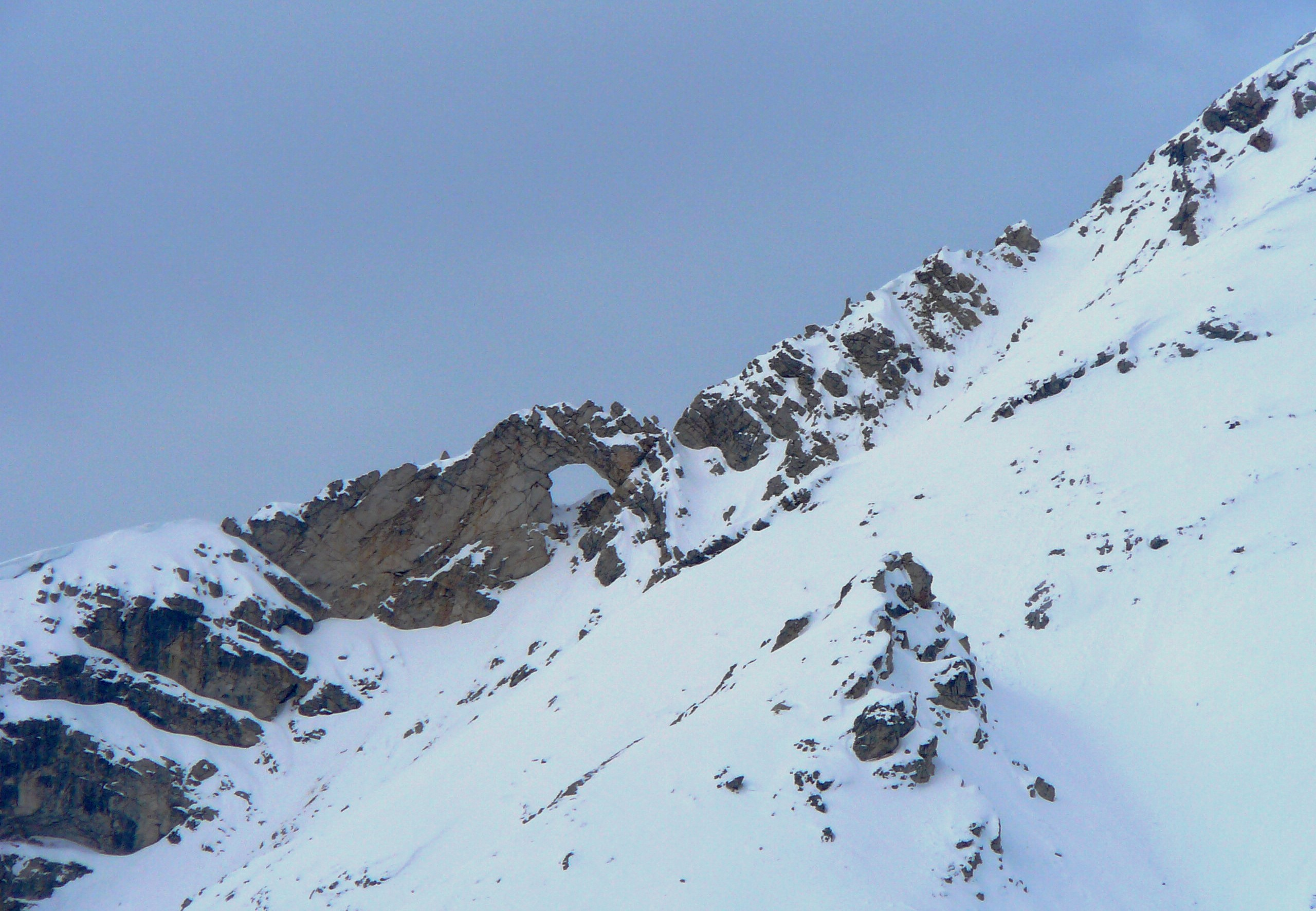 L'occhio di Dio sulla Croda Rossa d'Ampezzo